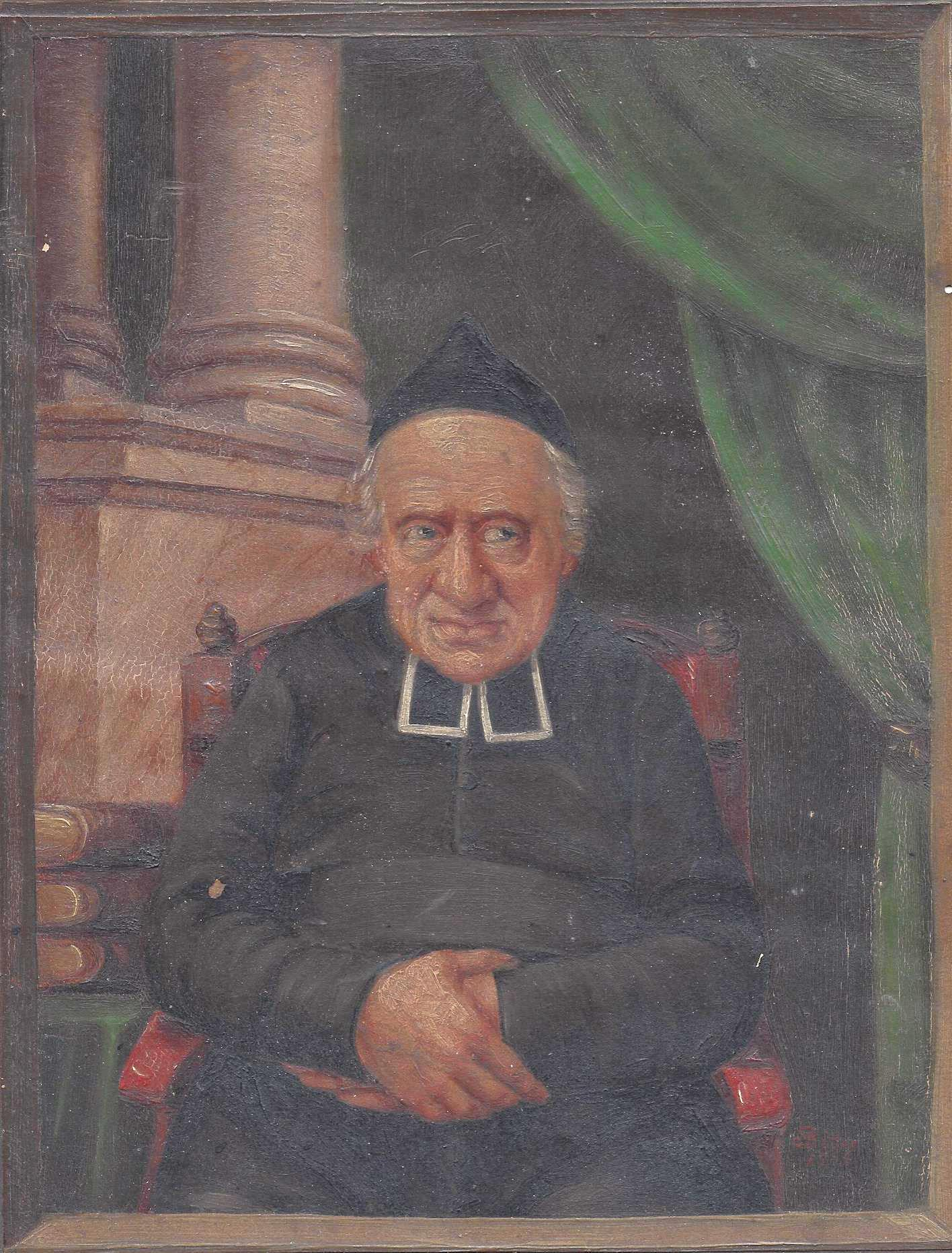 Achill Beck (1771-1953), Ölskizze von Carl Ritter, datiert 1850. Museum Alte Metzig Waldshut, Inventarnummer 87-44.